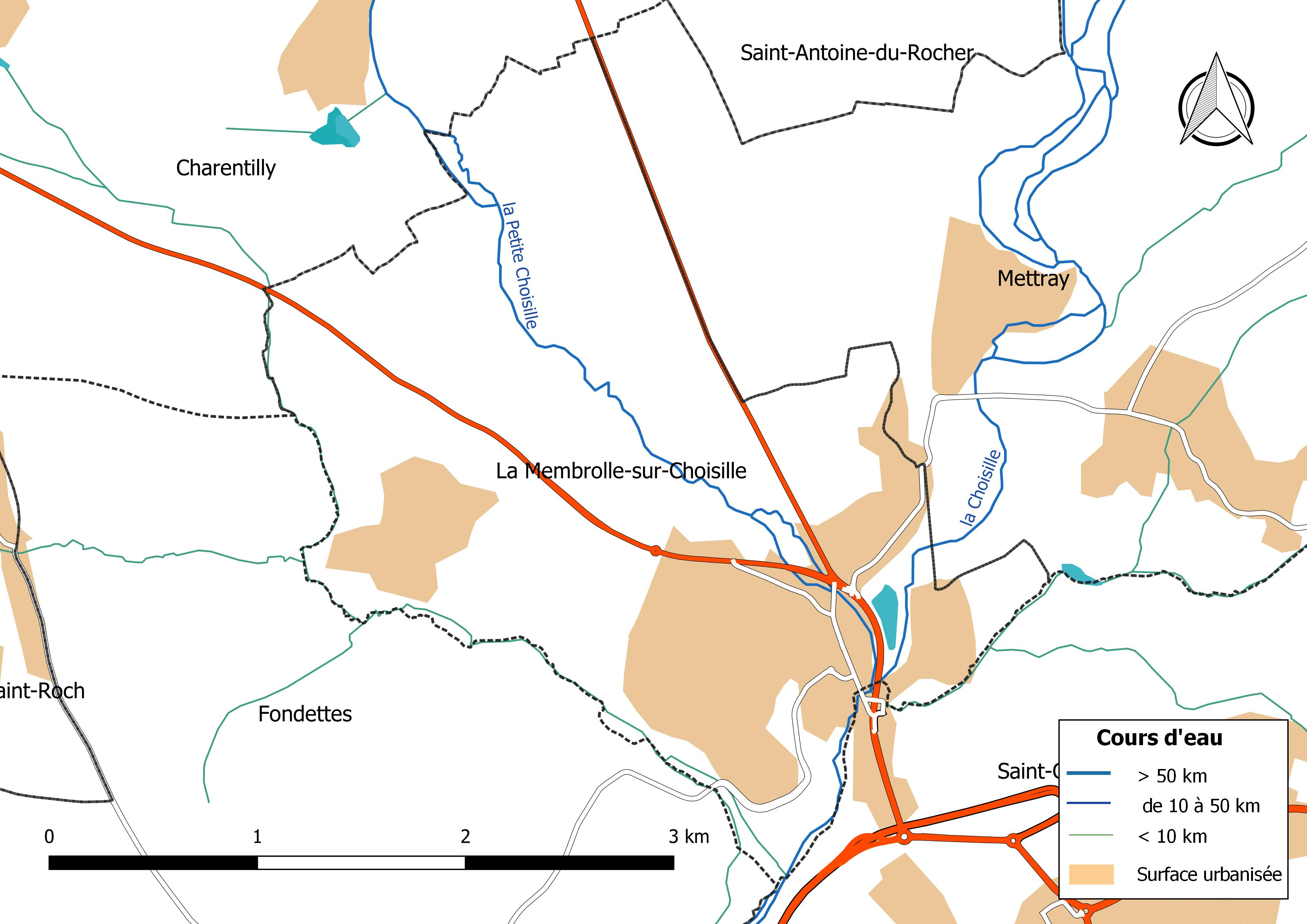 Carte du réseau hydrographique de la commune de La Membrolle-sur-Choisille (France).